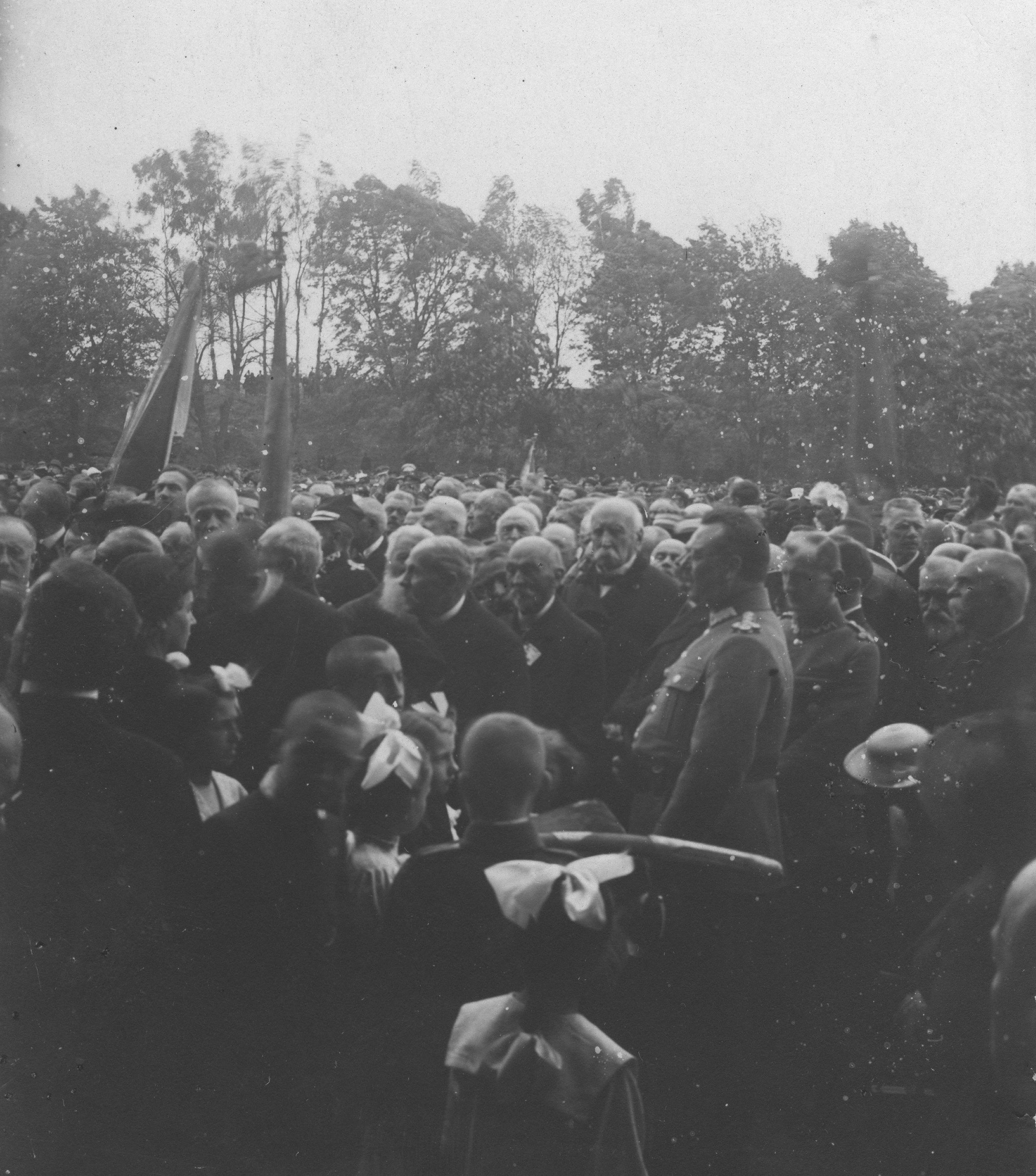 Wręczenie gen. Wacławowi Iwaszkiewiczowi szabli z XVII w. od mieszkańców Lwowa jako wyrazu wdzięczności za oswobodzenie miasta. Fragment uroczystości. Widoczni m.in.: gen. Wacław Iwaszkiewicz (na pierwszym planie z prawej), prezydent Józef Neumann. Koncern Ilustrowany Kurier Codzienny - Archiwum Ilustracji. Sygnatura: 1-W-162-2